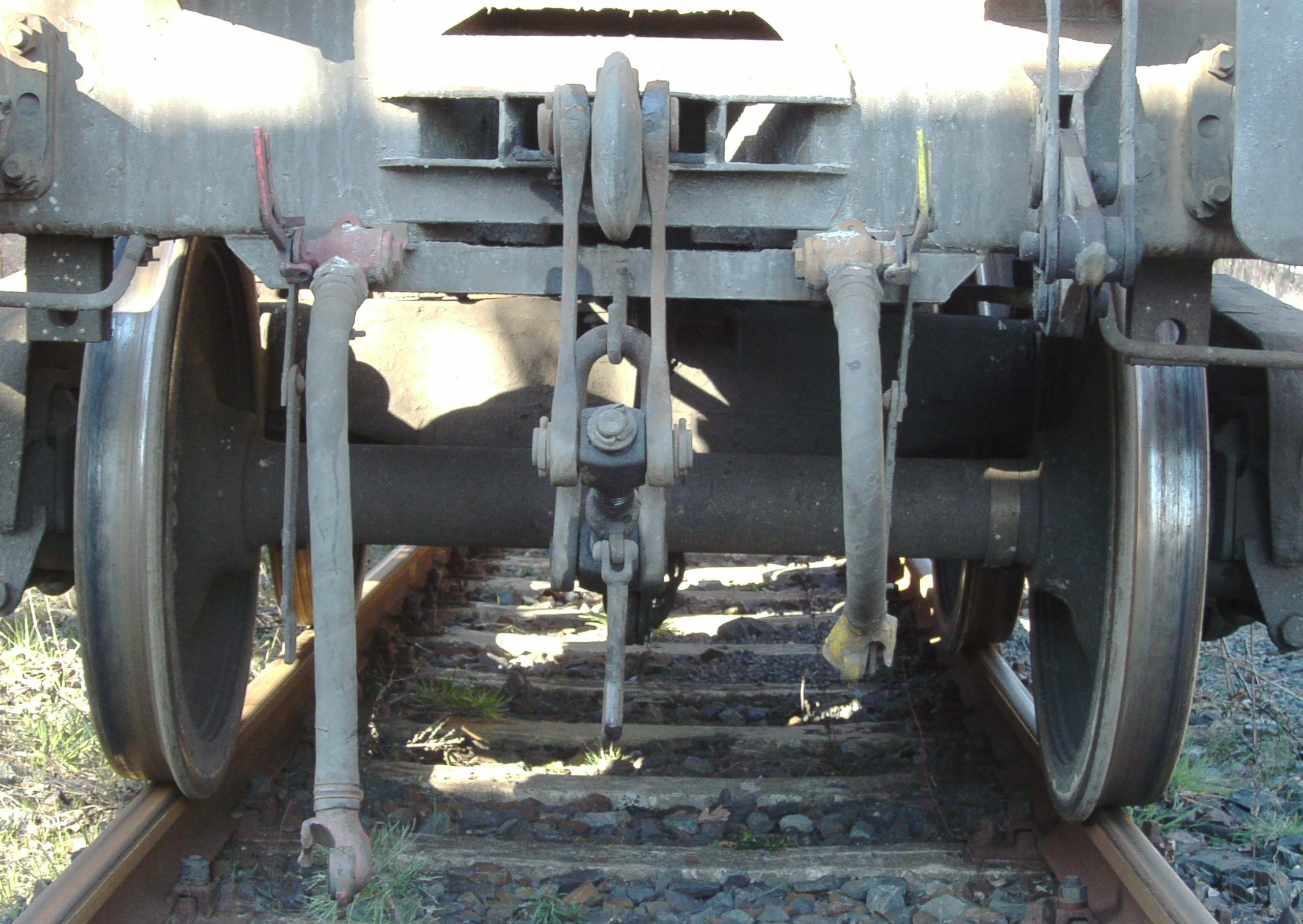 Seitenkippwagen Gattung Ua der Tschechischen Bahn - Zugeinrichtung Czech Railways Class Ua side-tipper - coupling system